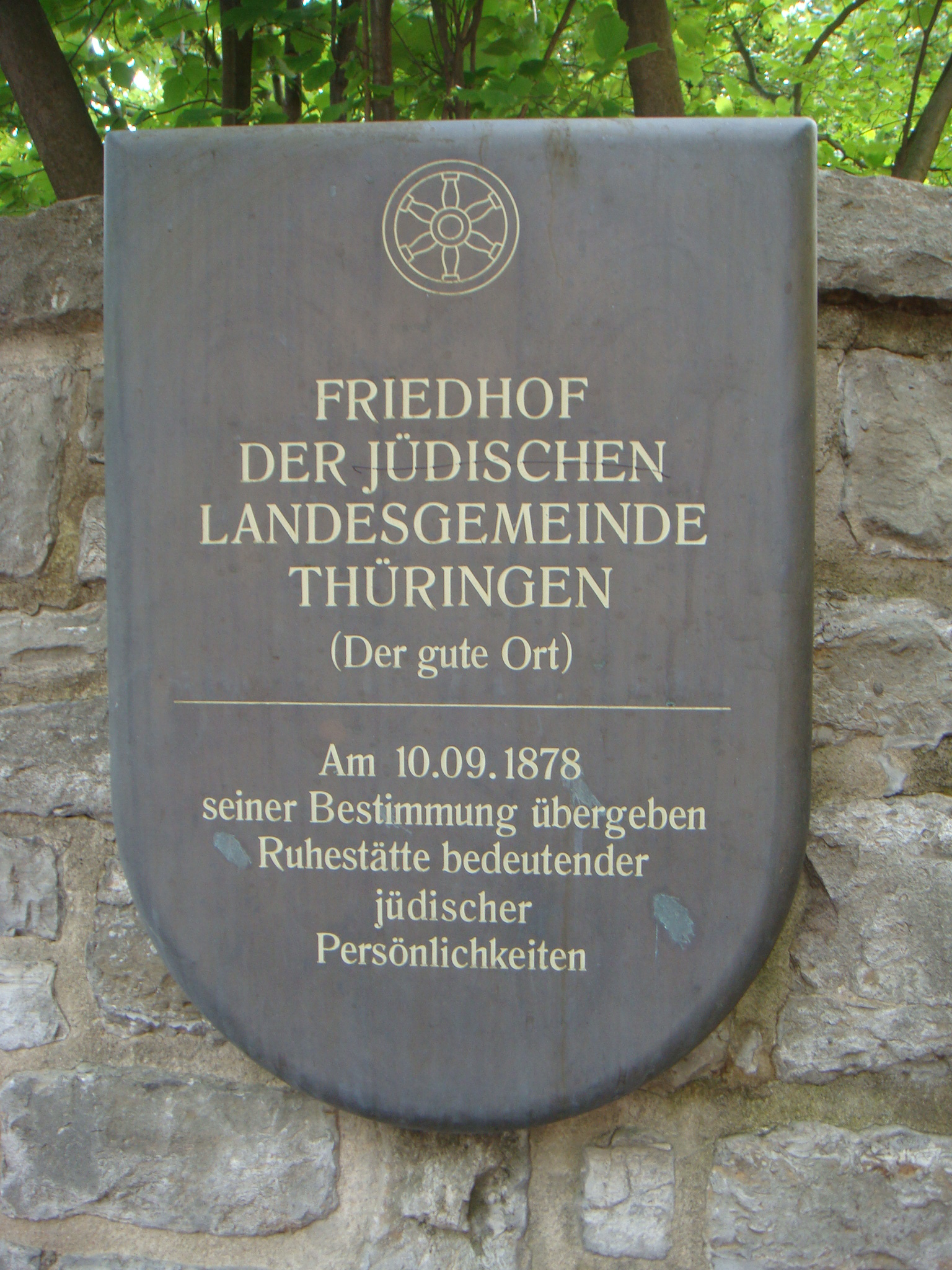 Eingangstafel des Neuen jüdischen Friedhofs an der Werner-Seelenbinder-Straße Erfurt